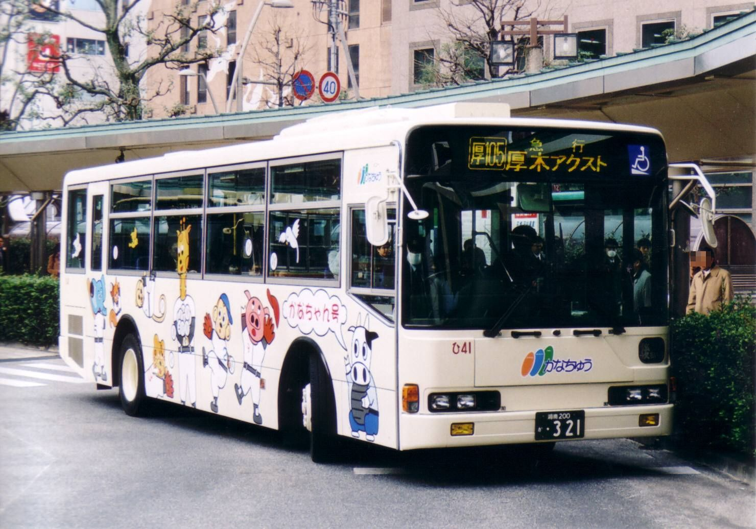 Kanachu Hi41（ひ41） Mitsubishi KL-MP35JM at Atsugi Bus Center